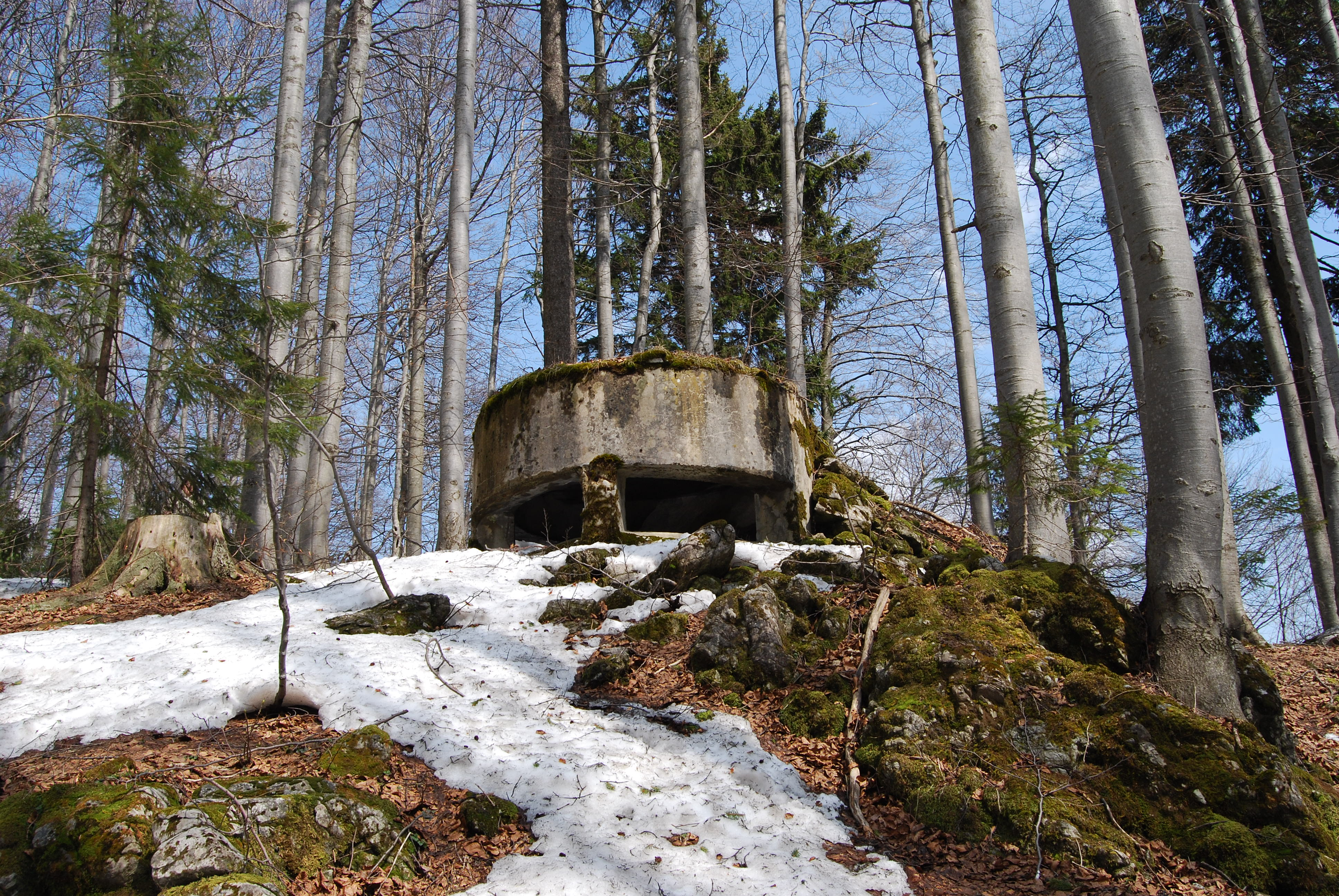 Bunker nekdanje Rupnikove linije pod vrhom Blegoša.